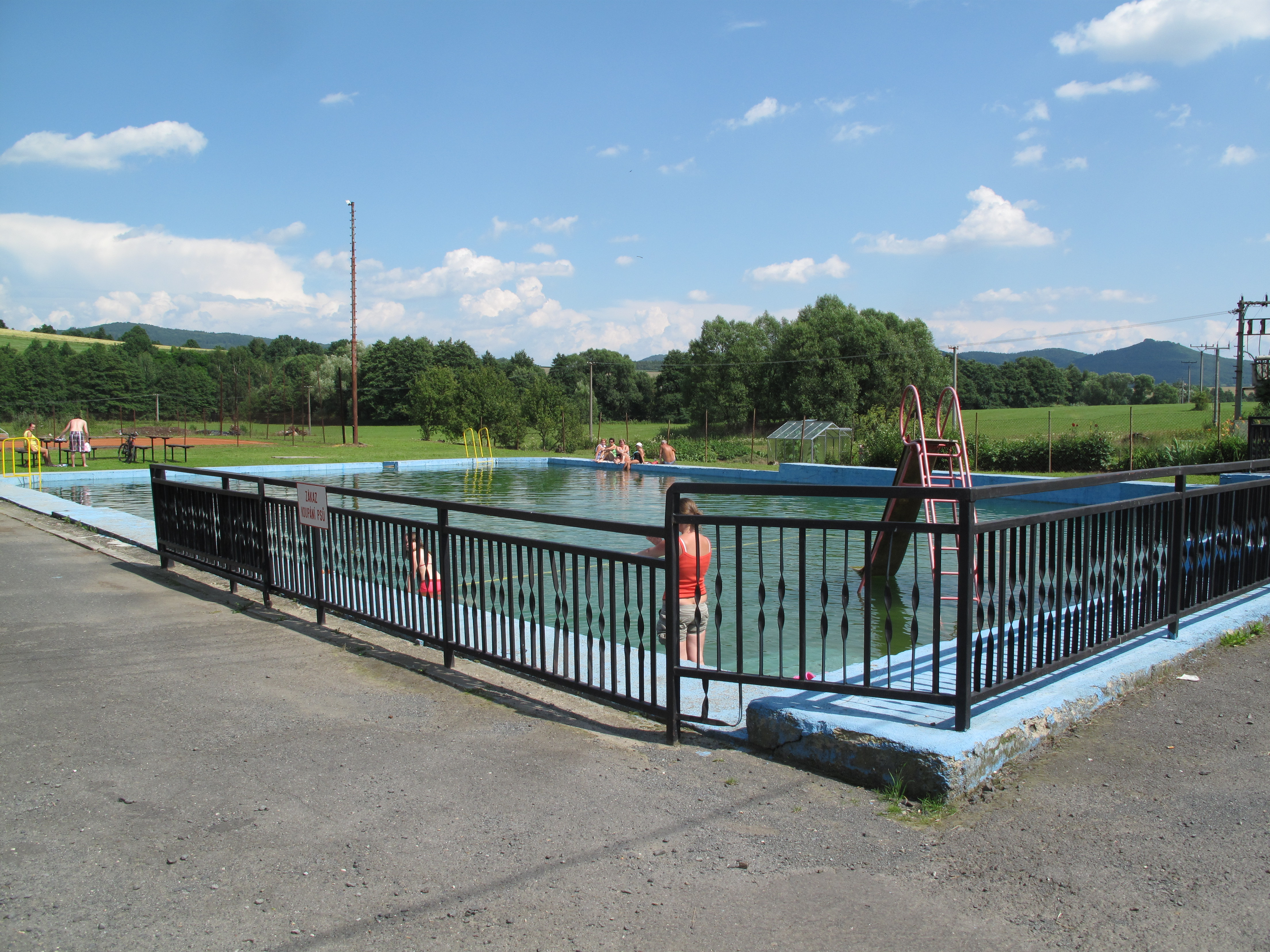 Sedlice, část Zahořan, požární nádrž, která slouží též k bezplatnému koupání. Hned u nádrže je hospoda se zahrádkou.